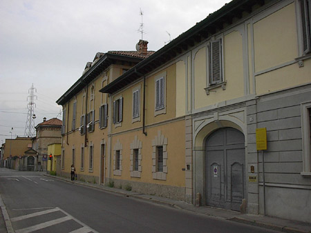 Villa Somaglia - Balconi